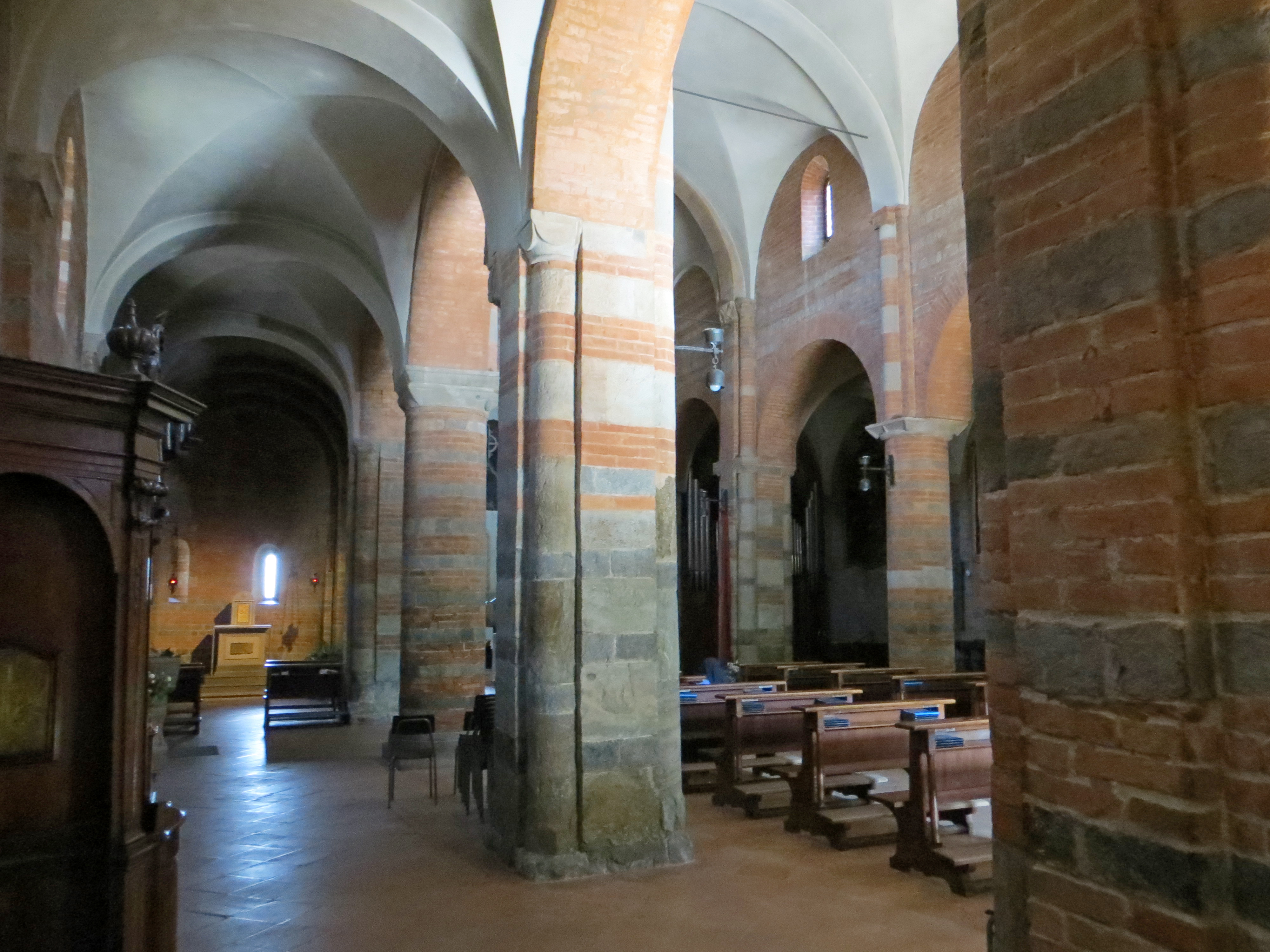 Pieve di San Prospero (Collecchio) - navata sinistra e centrale